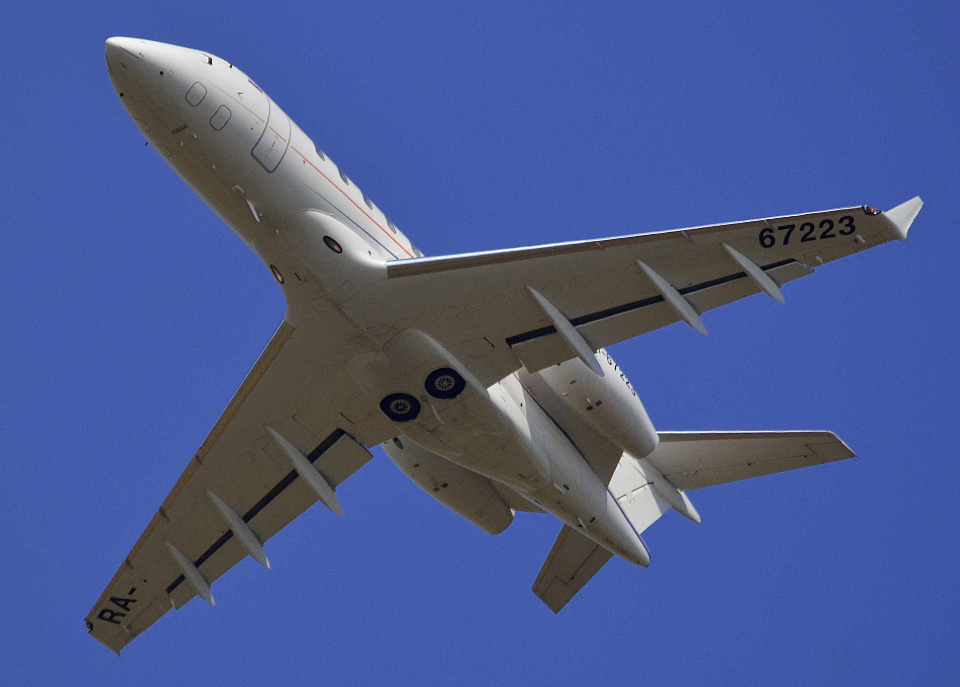 Можно увидеть здесь : You can see here